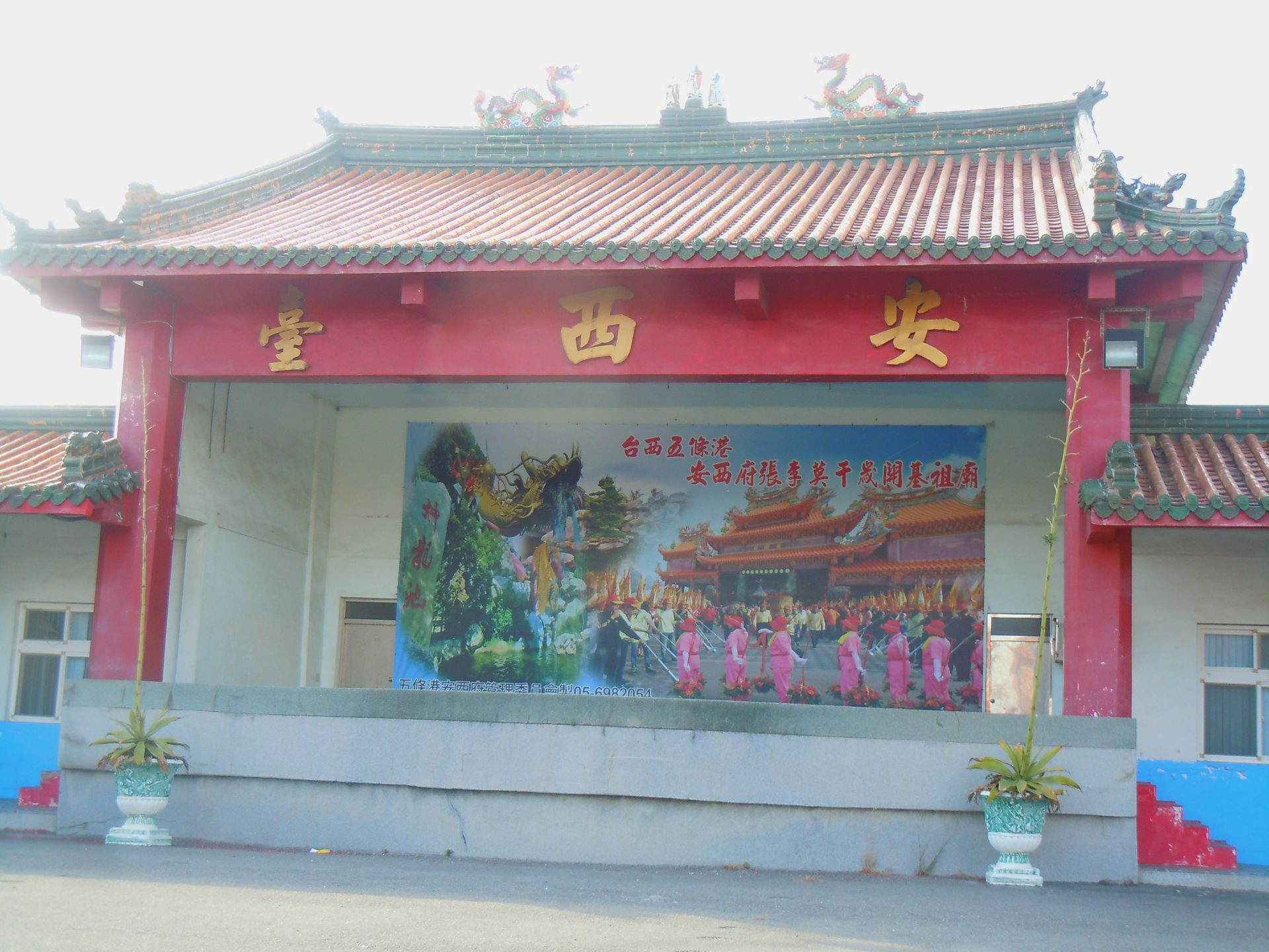 中文（台灣）: 五條港安西府位在雲林縣台西鄉。